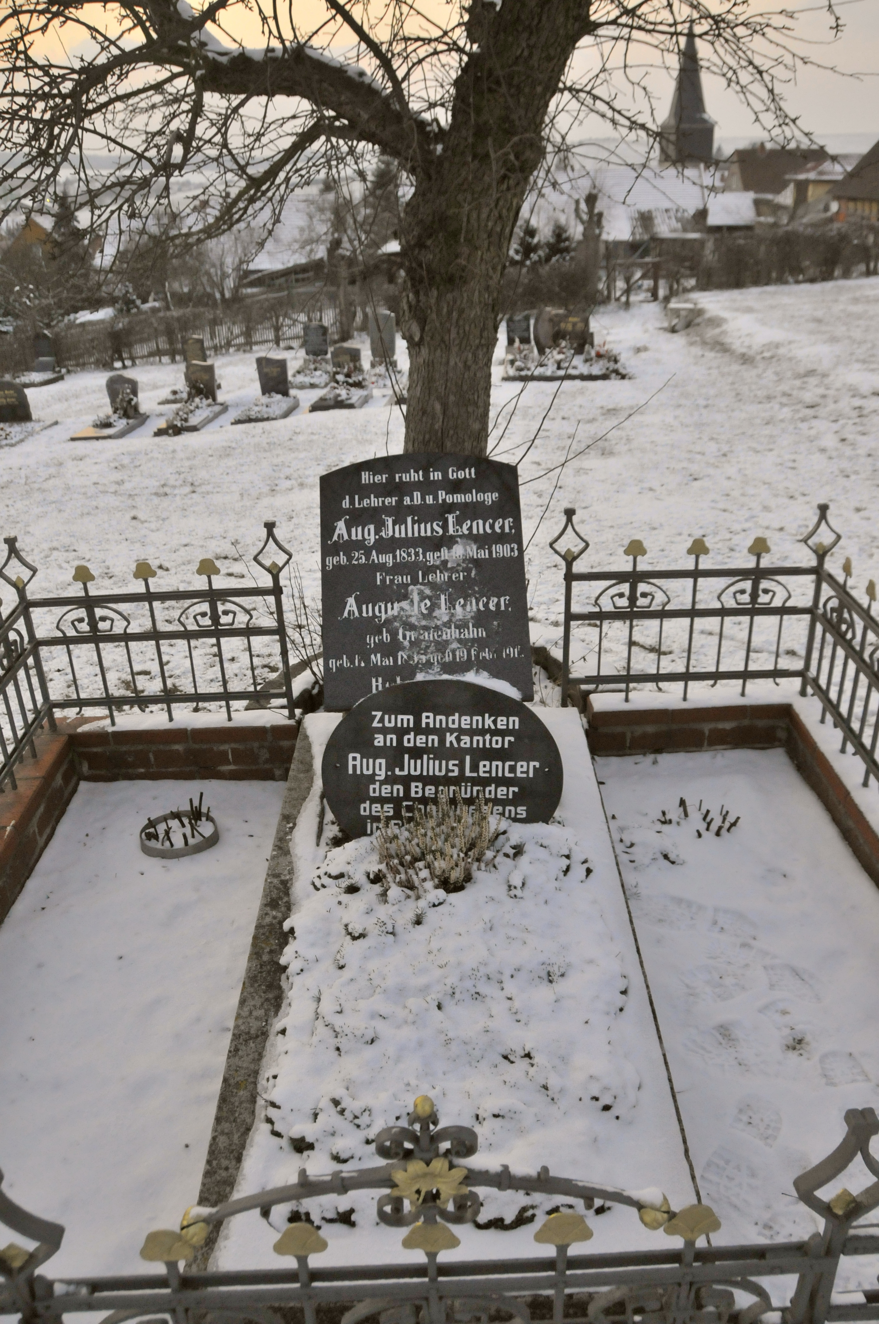 Lencer, Grab